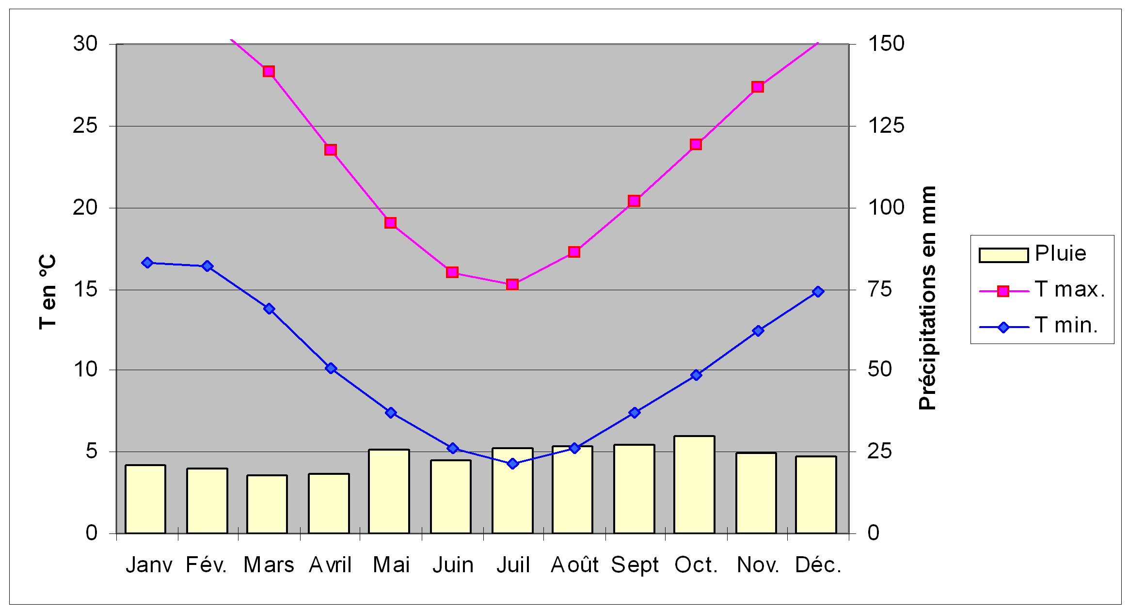 Diagramme climatique de la ville de Mildura (Australie), comprenant deux courbes, représentant les températures maximales et minimales, et un histogramme, représentant la pluviométrie, pour les douze mois de l'année.